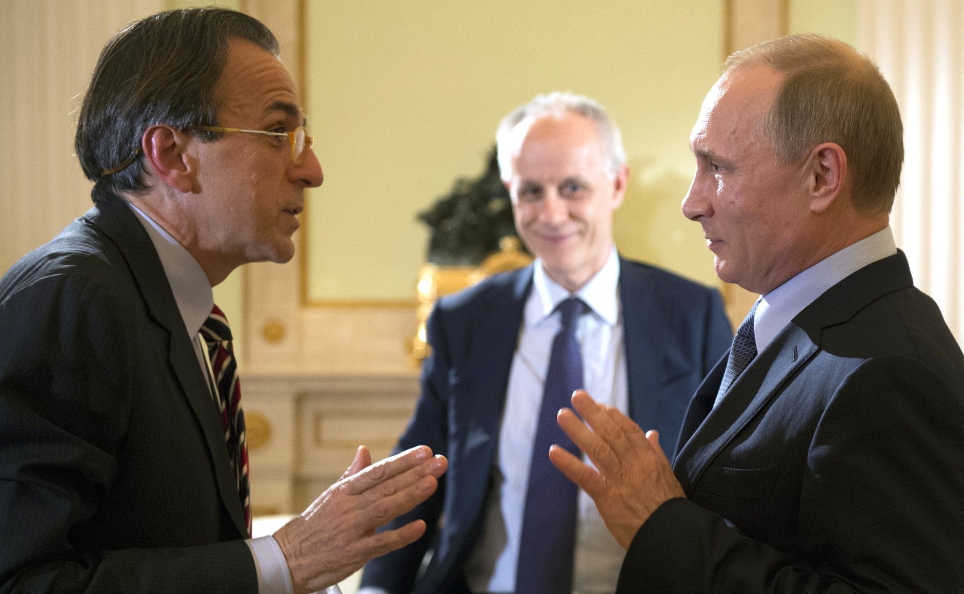 Владимир Путин с итальянскими журналистами Паоло Валентино (слева) и Лучано Фонтана